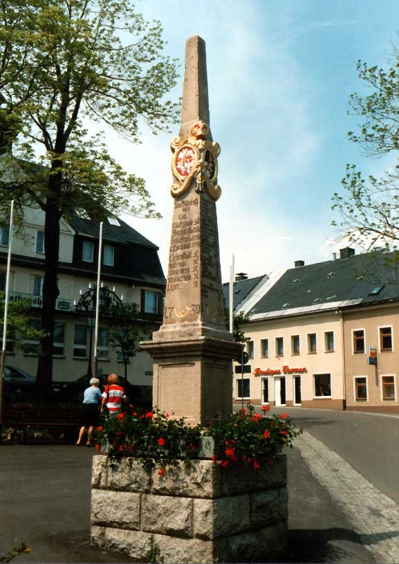 Kursächsische Distanzsäule auf dem Marktplatz im Kurort Oberwiesenthal